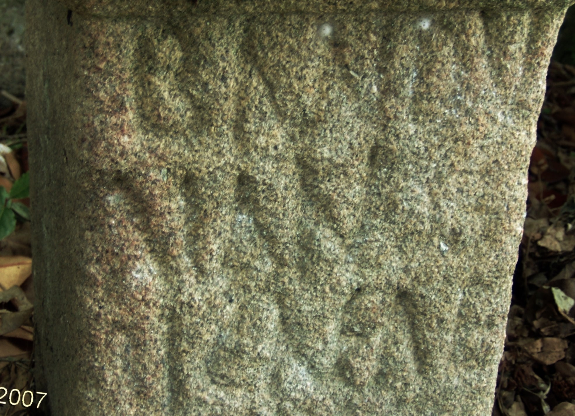 Fotografiada en 2007 en el lugar original, en el patio de un pazo. A la izquierda hay una losa que estaba encima del ara protegiéndola y haciendo de mesa en un jardín. En la segunda línea se ve claramente la M de LÁMBRICA. Eiras, San Amaro, provincia de Ourense.